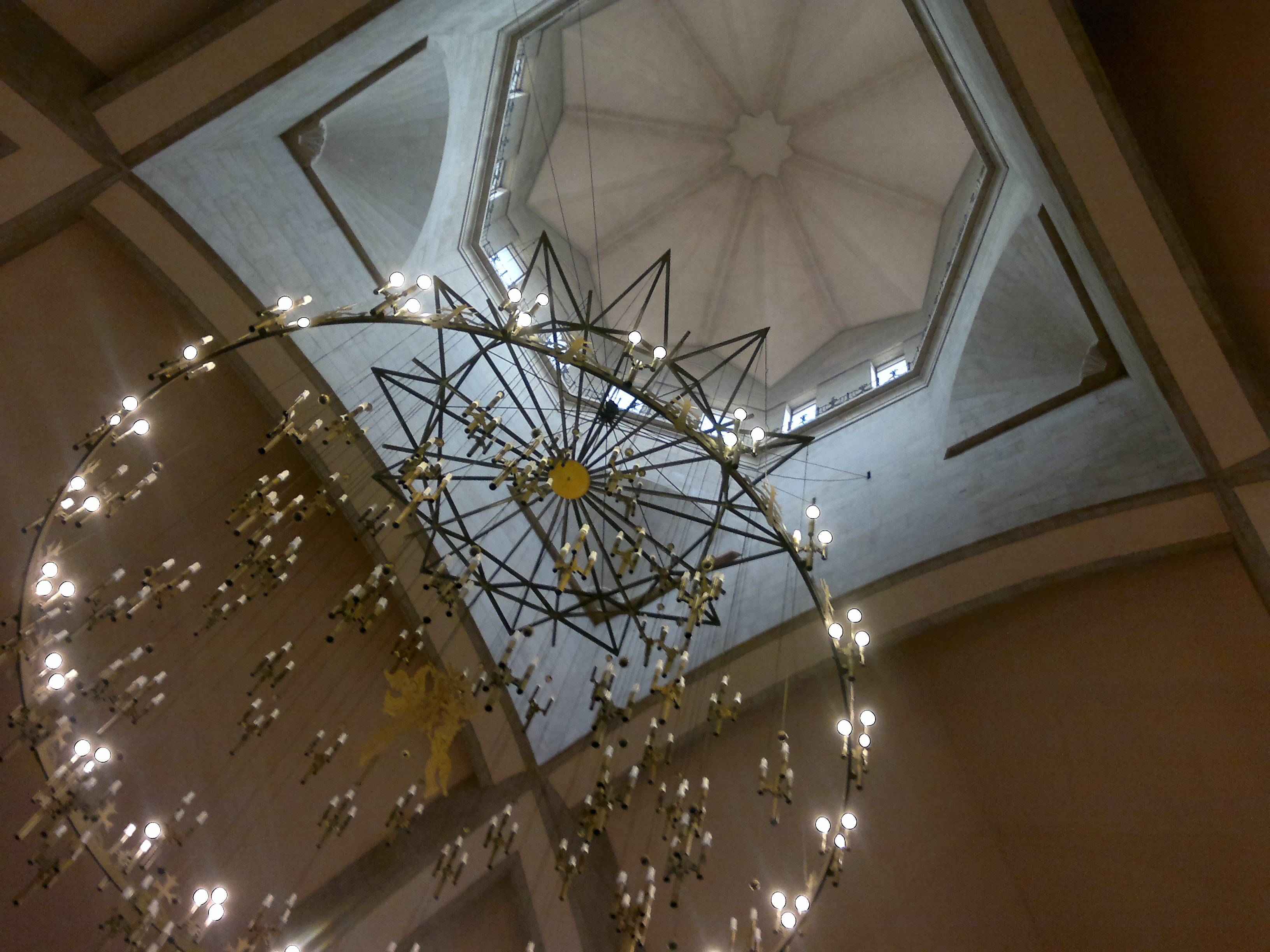 Купол Кафедрального собора Святого Григория Просветителя в Ереване